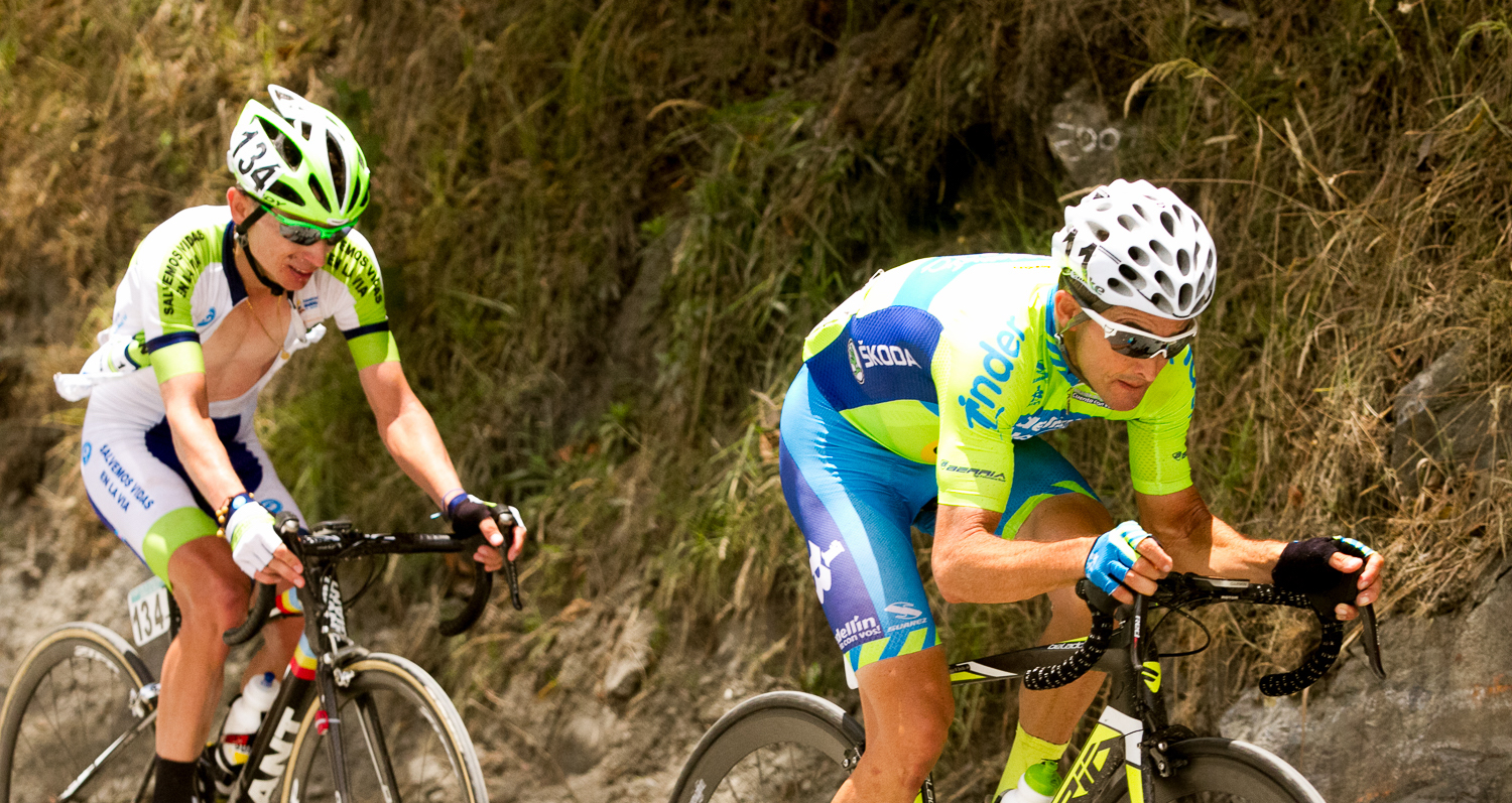 Óscar Sevilla y Álvaro Gómez Etapa 9 Vuelta a Colombia 2017 Jueves 10 de agosto de 2017. 137Kms La Dorada - Alto de Letras.